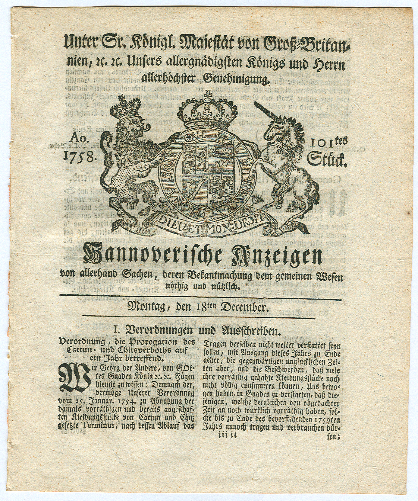 Unter Sr. Königl. Majestät von Groß-Britannien, etc. etc. Unser allergnädigsten Königs und Herrn allerhöchster Genehmigung. Ao 1758, 101tes Stück. Hannoverische Anzeigen von allerhand Sachen, deren Bekanntmachung dem gemeinen Wesen nöthig und nützlich. Montag, den 18ten December. Titelseite mit dem Wappen des Königs. In der Umschrift: Honi soit qui mal y pense, auf dem Band darunter: 'Dieu et Mon Droit". Format ca. 17 x 20,5 cm